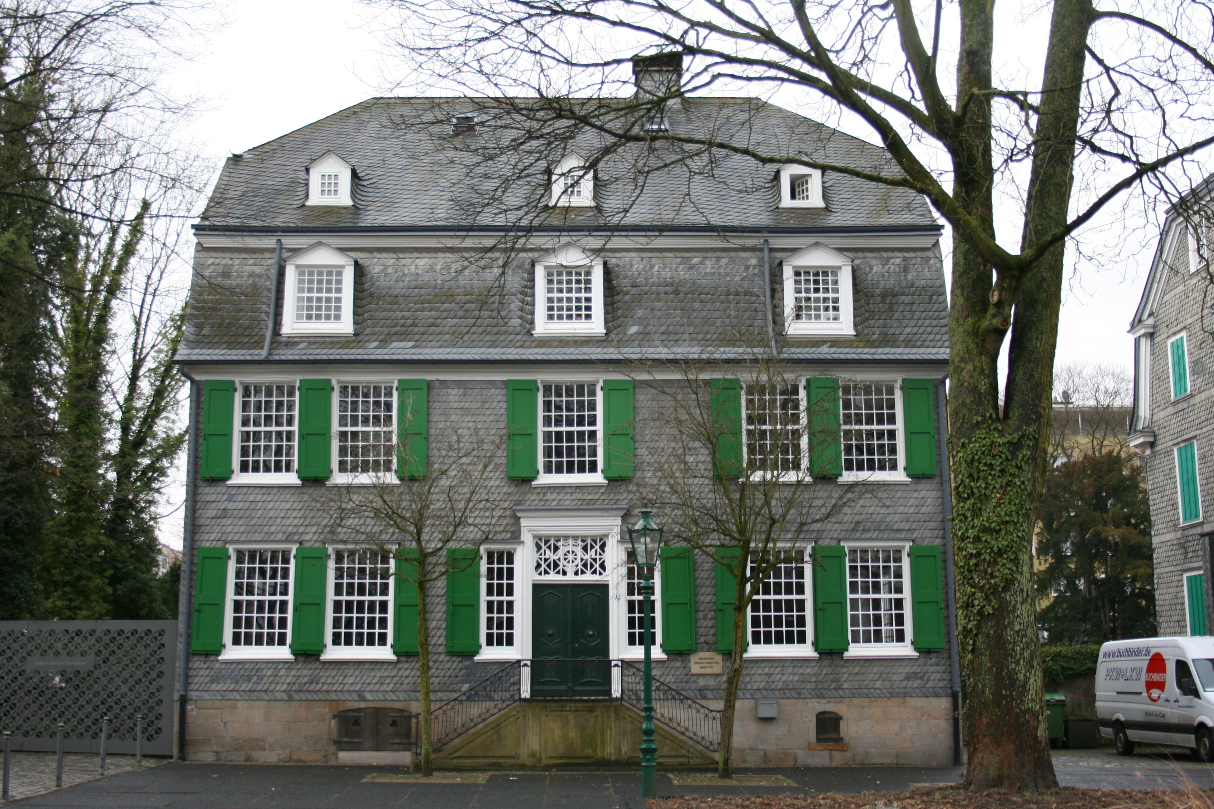 Engels-Haus in Wuppertal